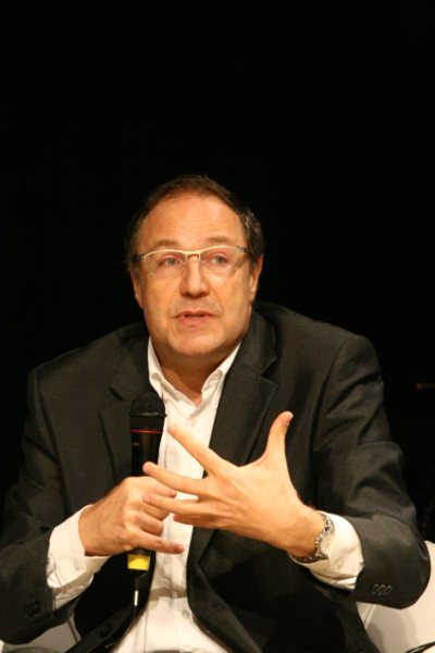 Pierre Lévy. Foto: Damião Francisco